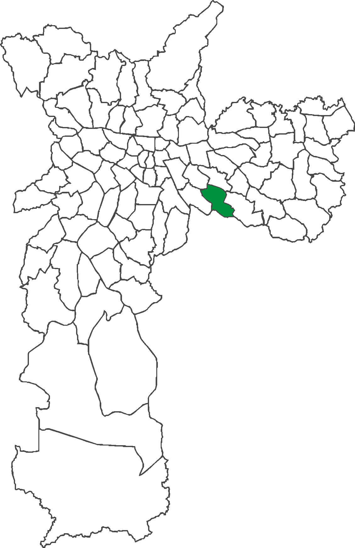 Localização do distrito de São Lucas no município de São Paulo.